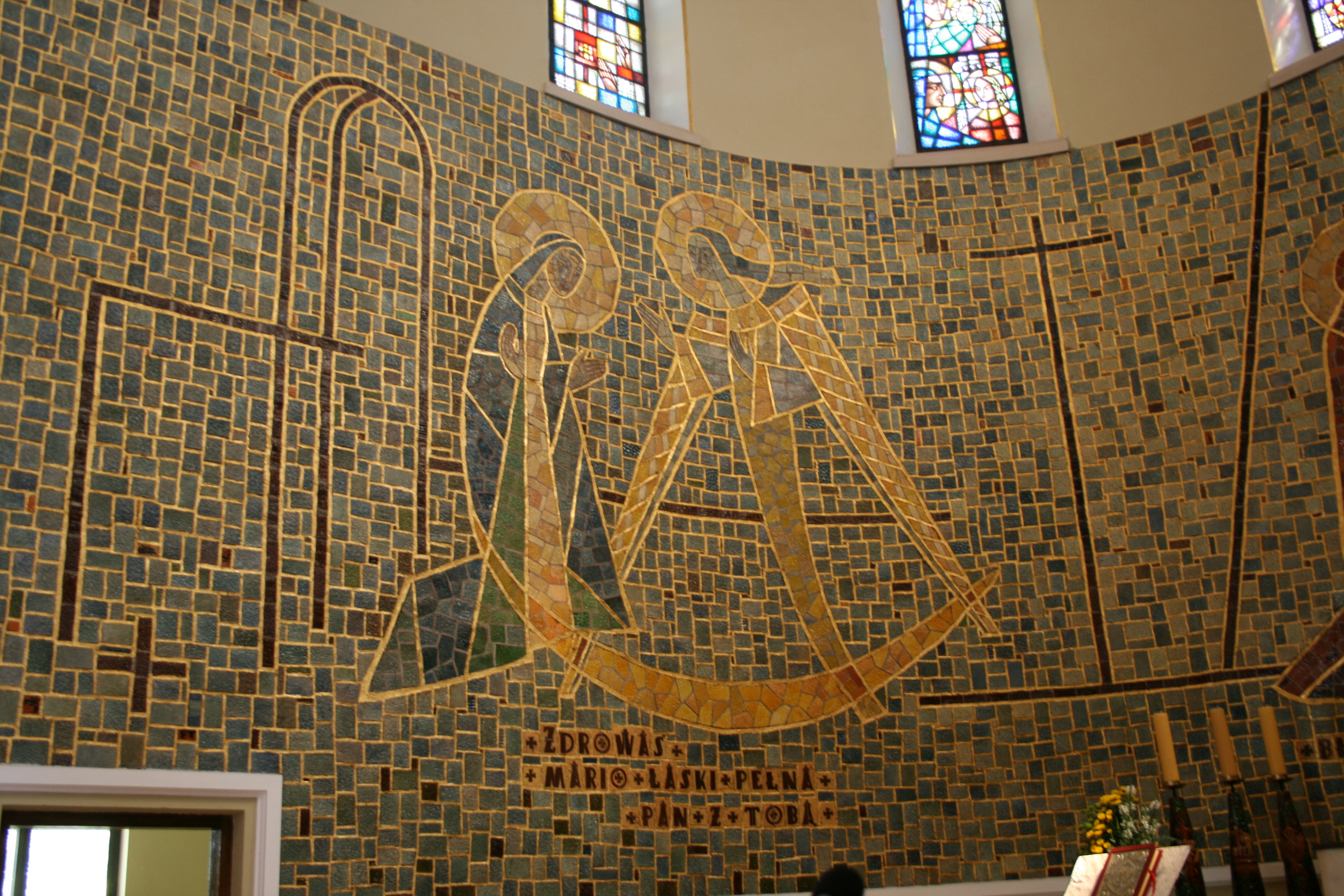 Wnętrze kościoła pw. Nawiedzenia NMB w Medyni Głogowskiej, .Projektował prof. Jan Budziło